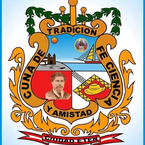 অসমীয়া: escudo de Ciudad Eten